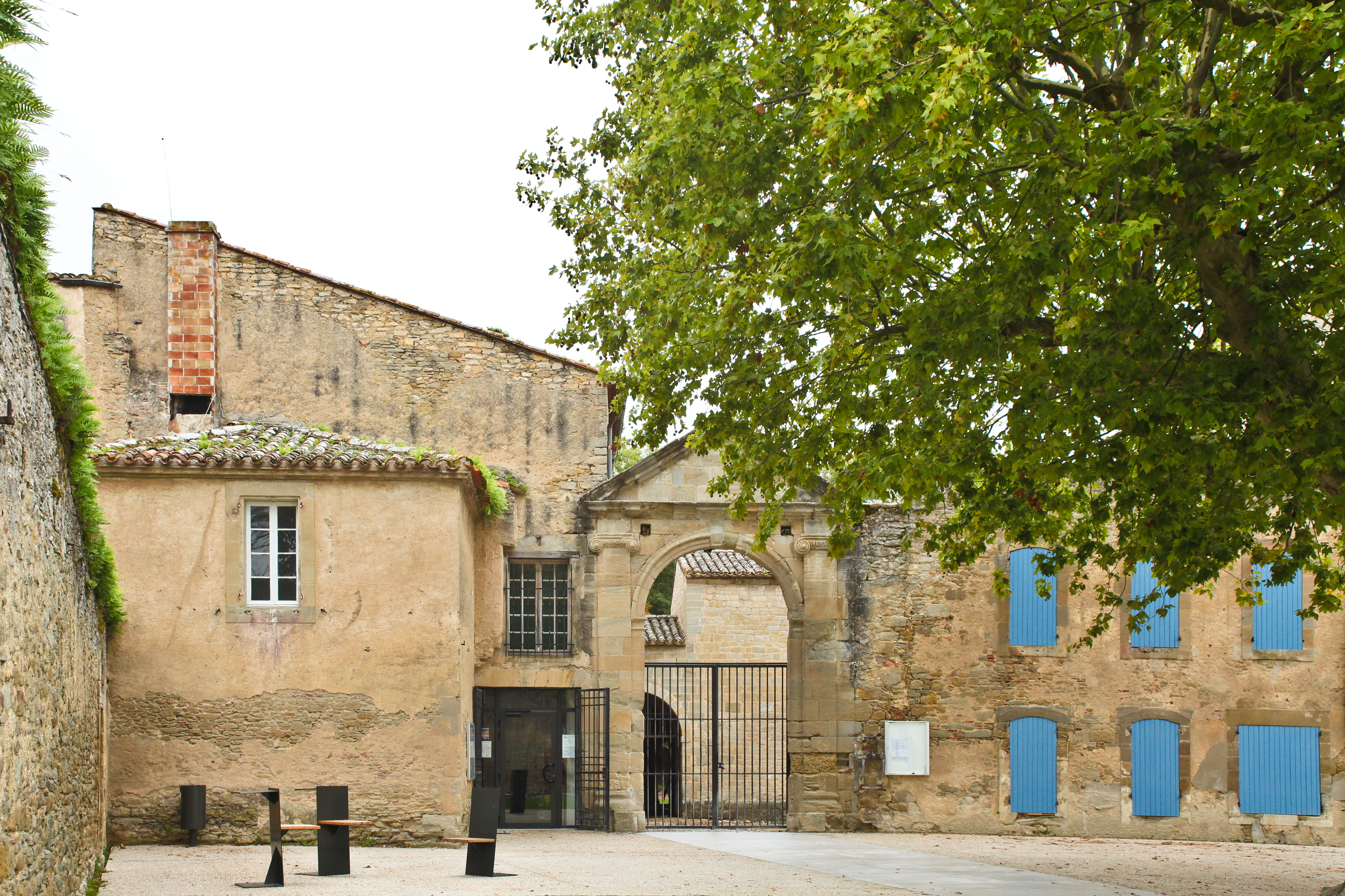 Abbaye de Saint-Papoul, les maisons canoniales